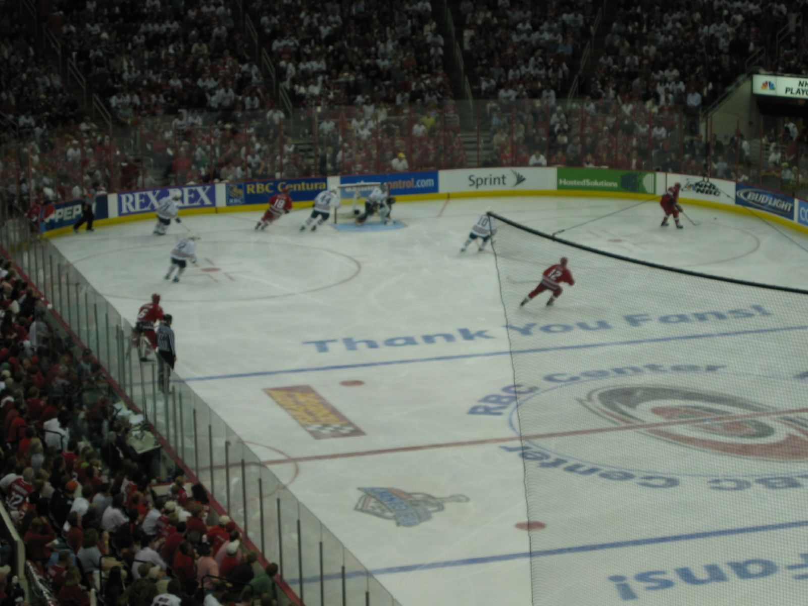 2006 stanley cup